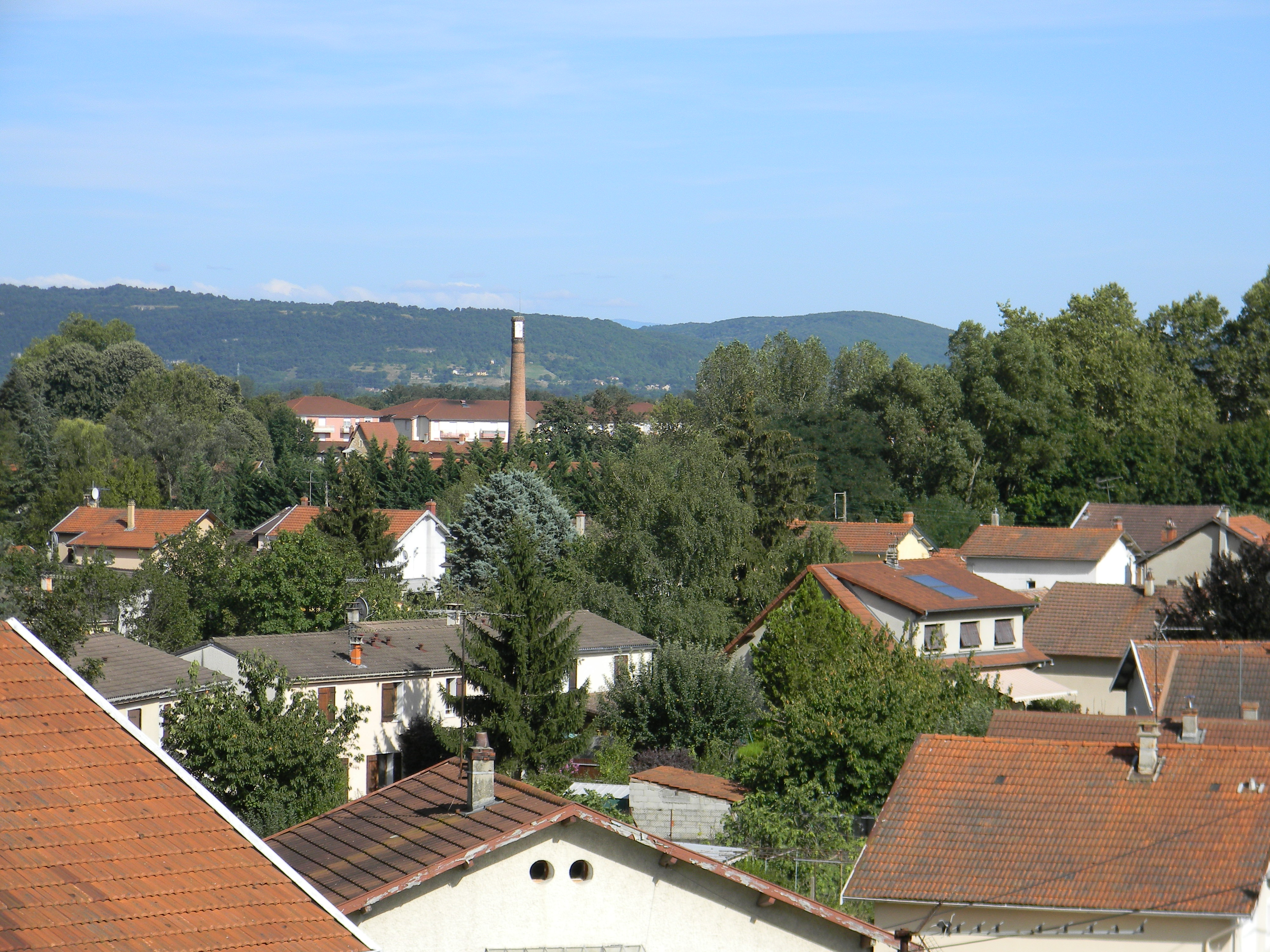 Vue sur Pont-de-Chéruy depuis les hauteurs ; au loin, une cheminée de l'ancienne usine de la société Grammont.